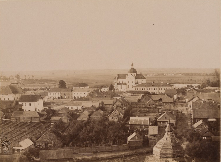 Беларуская (тарашкевіца): Нясьвіж (Niaśviž), на пярэднім пляне квартал на рагу вуліц Бэнэдыктынскай (vulica Benedyktynskaja) і Віленскай (vulica Vilenskaja).